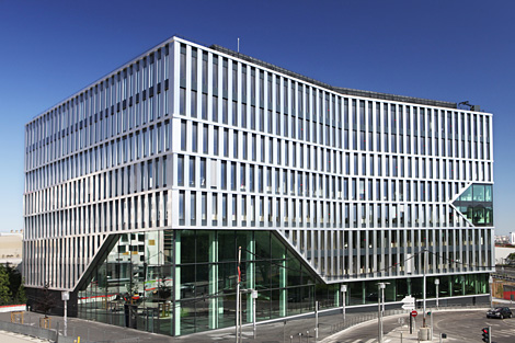 Siège de SES-imagotag à Nanterre